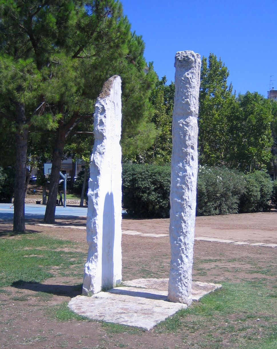 La grande meridiana di Bari, situata nel Parco Largo 2 giugno, opera scultorea di Antonio Paradiso su progetto di Antonio Rini e Francesco Azzarita dell'Associazione Barese Astrofili, fotografata alle 13 (mezzogiorno solare) del 18 agosto 2011 da Michele Crudele